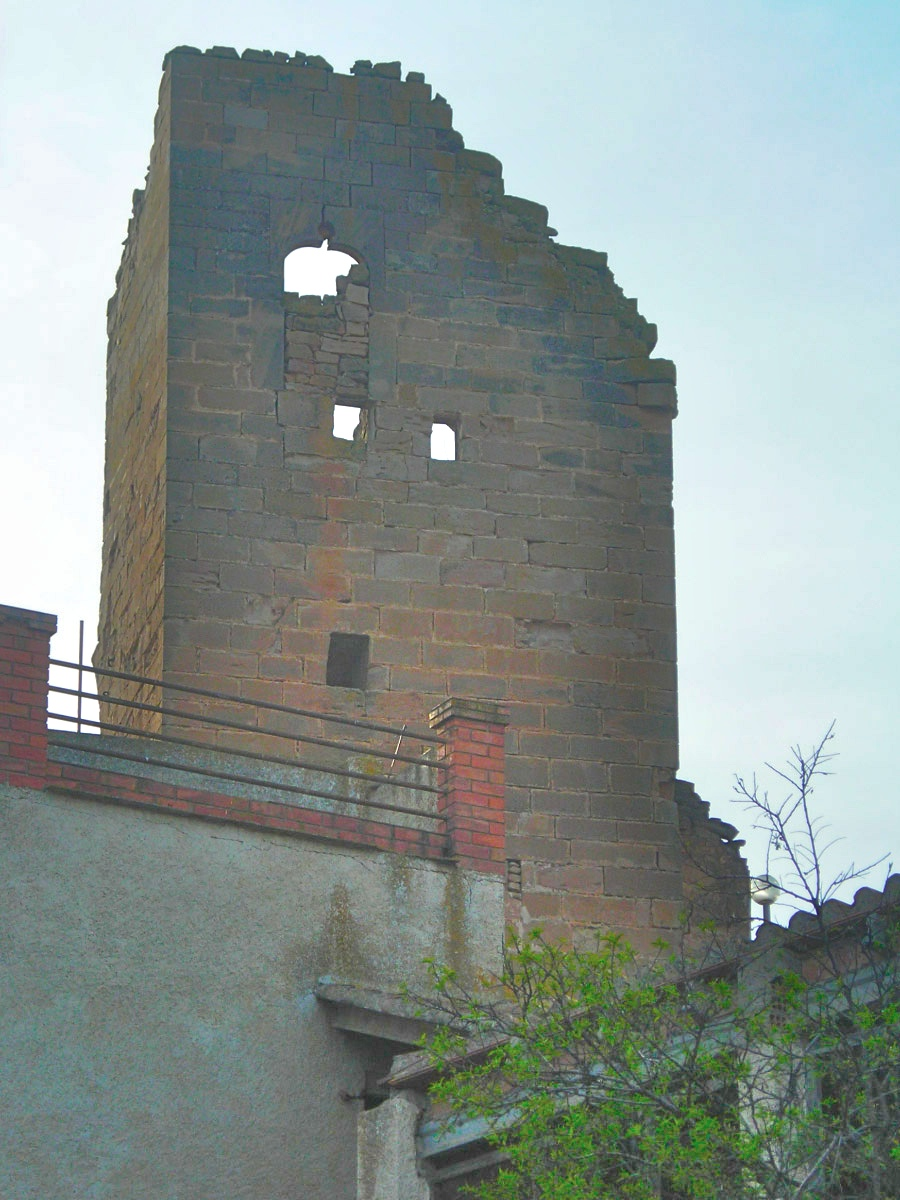 Restes del Castell de l'Albagés